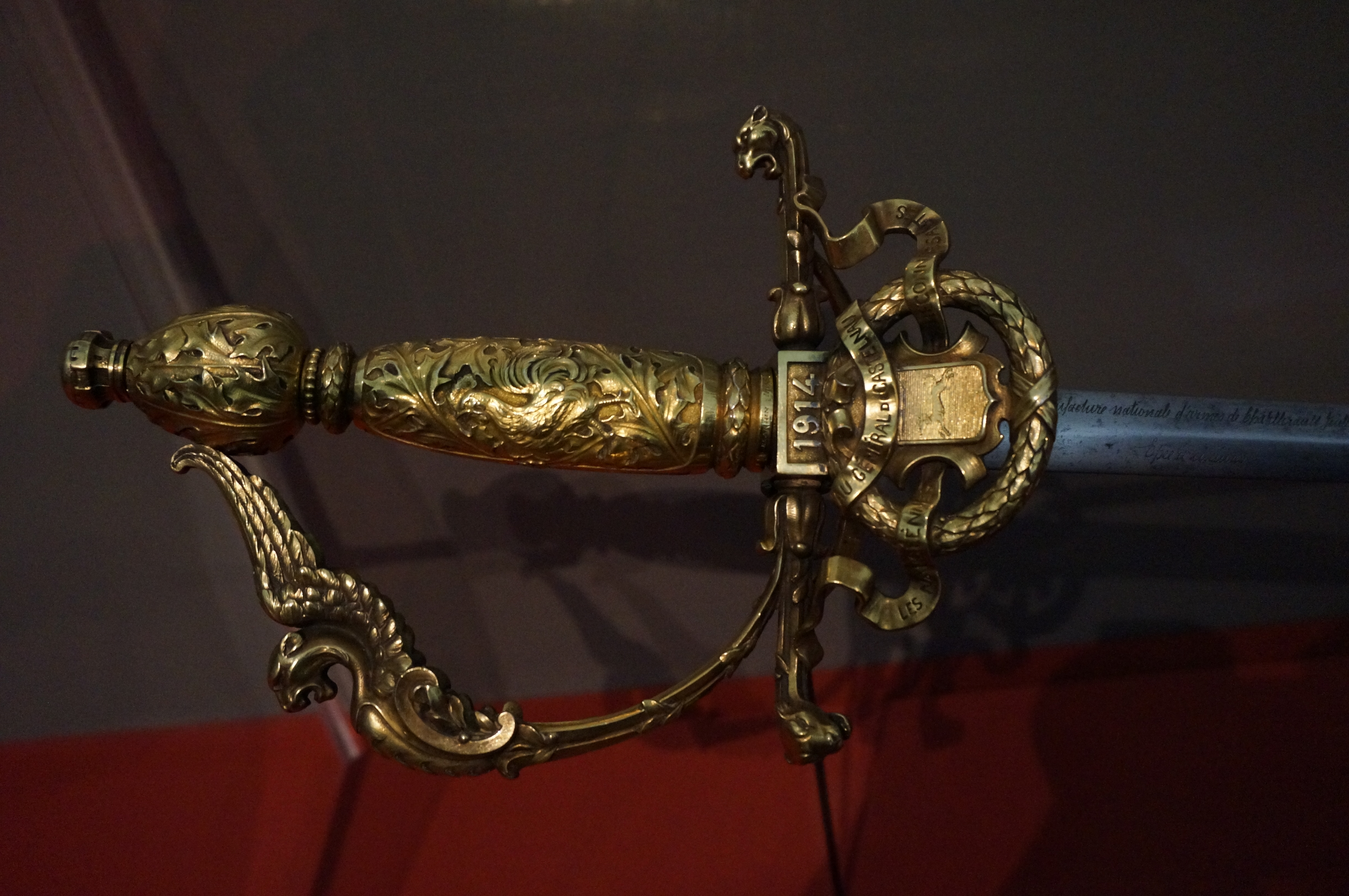 Lors de l'exposition Été 1914 Nancy et la Lorraine dans la guerre.Epée offete par les dames de Nancy par souscription publique.